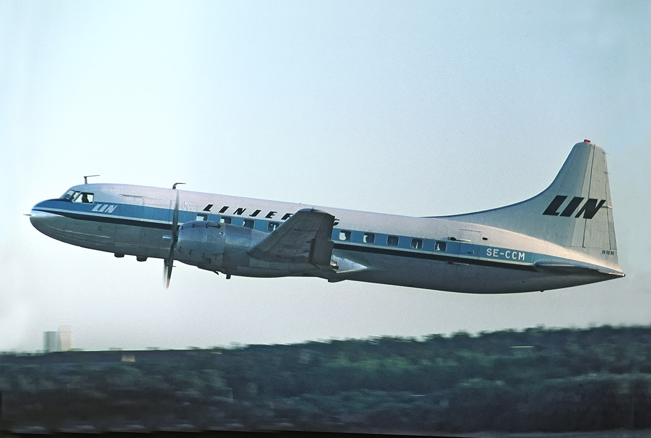 Linjeflyg Convair 440-75 Metropolitan SE-CCM at Stockholm-Bromma Airport